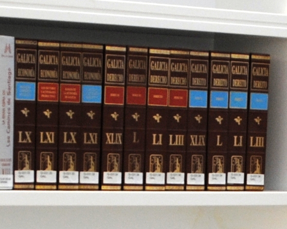 Algúns volumes de Dereito e Economía pertencentes á colección Galicia de Hércules.